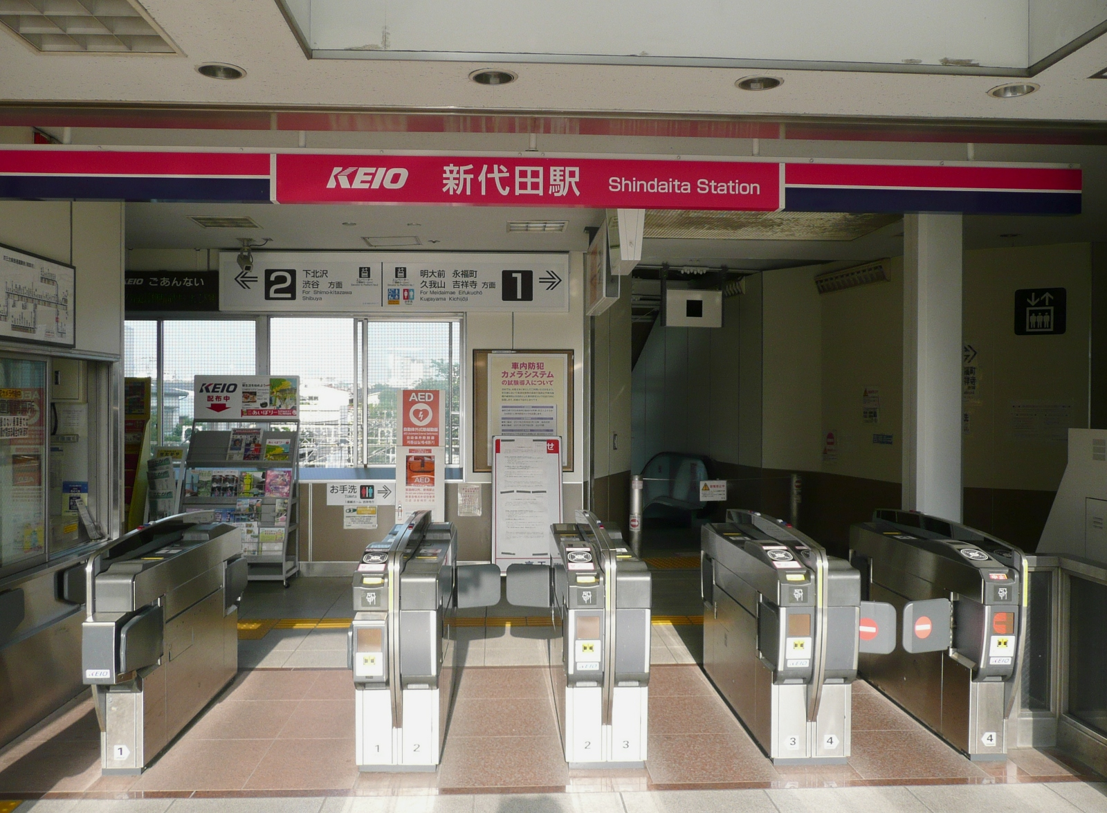 新代田駅改札口